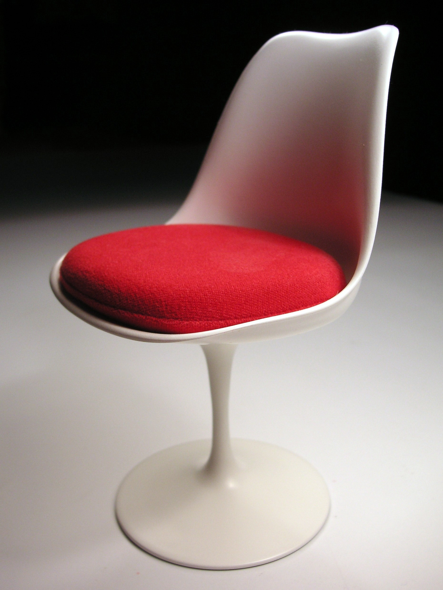 Saarinen, "Tulpanstolen", "Tulpenstuhl", "Tulip chair"